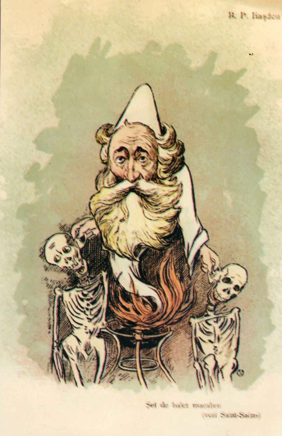 Bogdan Petriceicu Hasdeu (caricatură din Albumul Contemporani). Șef de balet macabru (vezi Saint Saens)